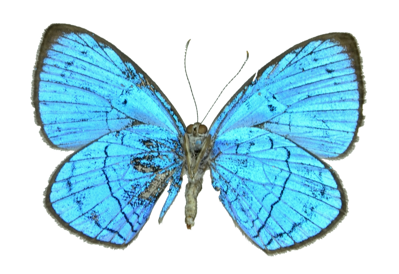 Semomesia croesus ventral view. Eastern Ecuador